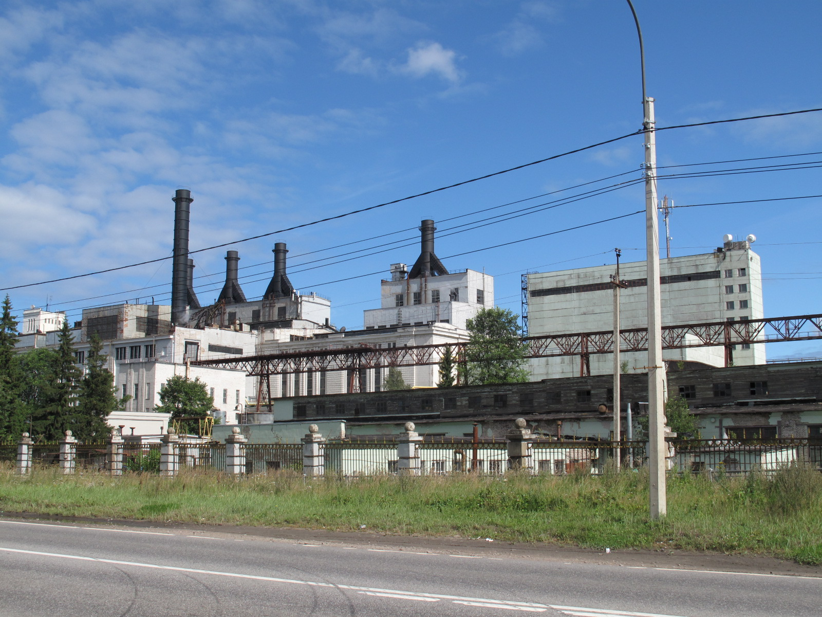 Здание Дубровская ТЭЦ (8-я ГРЭС), город Кировск Ленинградской области